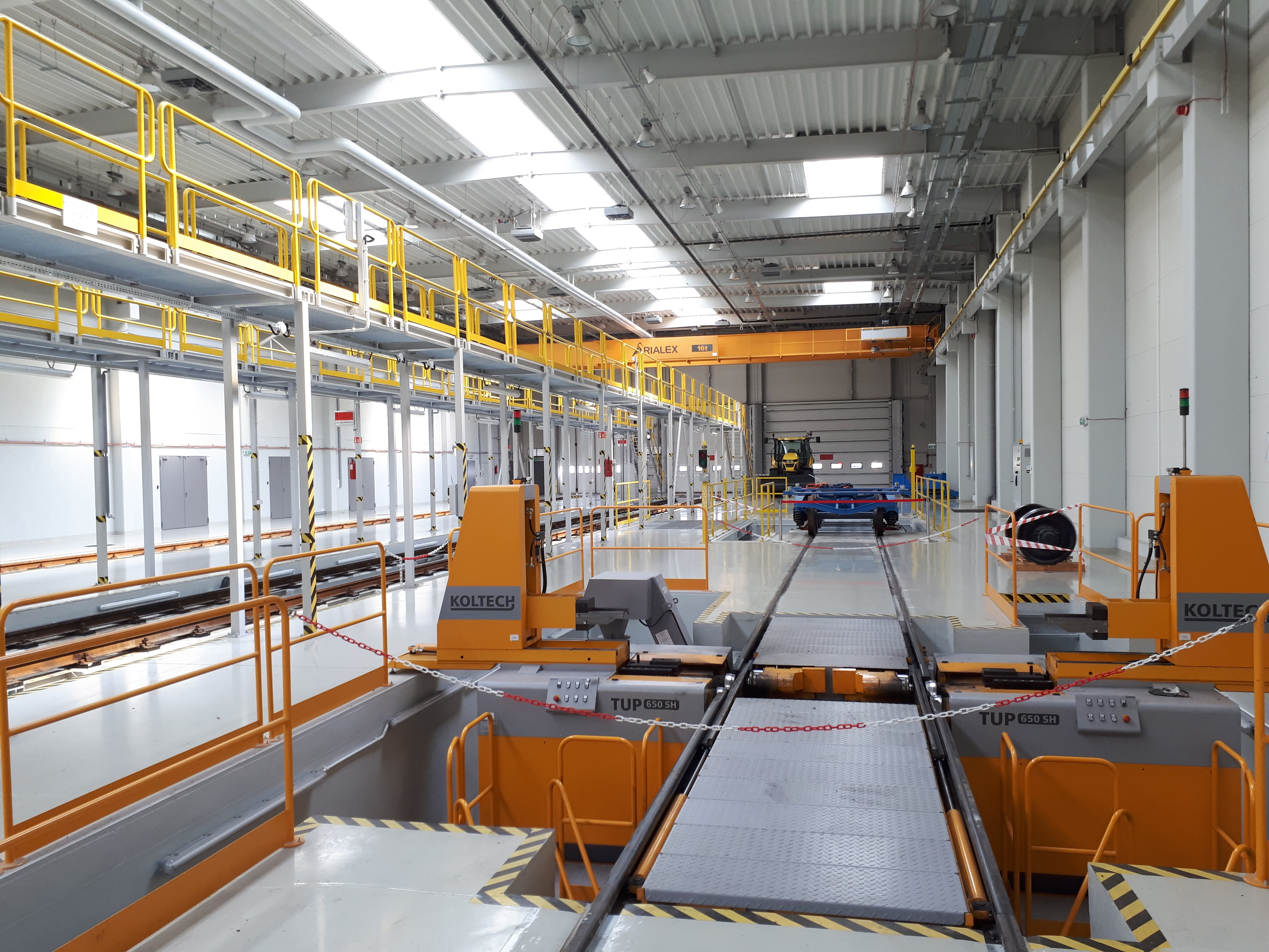 Zaplecze Łódzkiej Kolei Aglomeracyjnej niedaleko stacji Łódź Widzew.